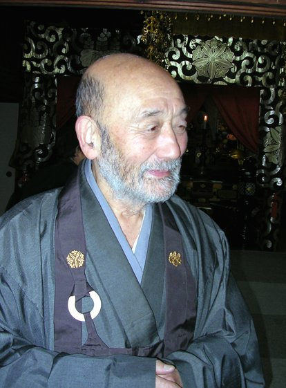 Harada Tangen Rōshi, zdjęcie zrobione w grudniu 2004 r.